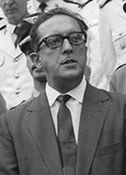 Carlos Frederico Werneck de Lacerda, governador do Estado da Guanabara, comemora a criação do Estado da Guanabara no Palácio Tiradentes, Rio de Janeiro, 1962. Arquivo Nacional. Fundo Correio da Manhã. BR_RJANRIO_EH_0_FOT_PPU_04265_0006